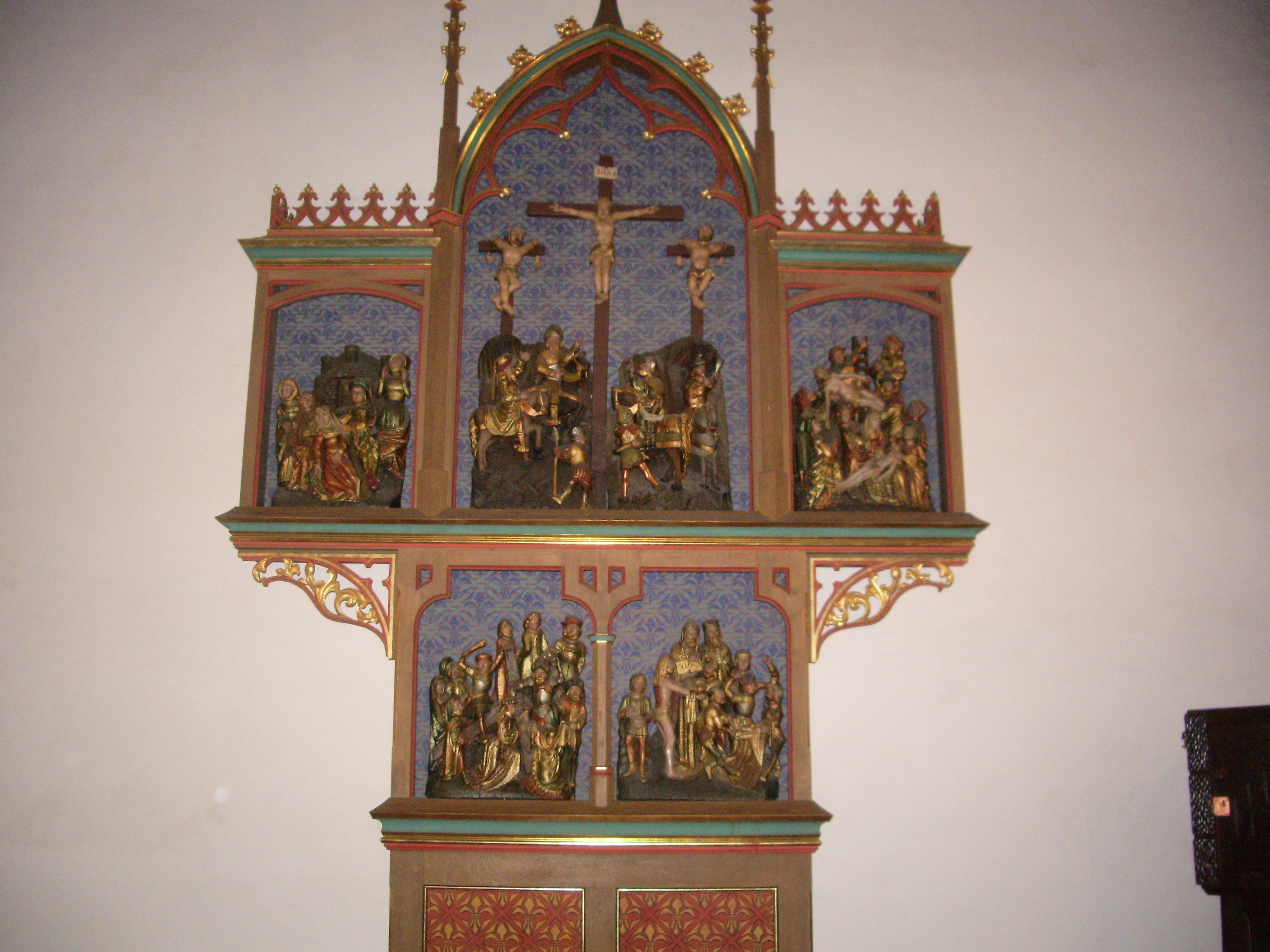 Reliquiar der Heilige Drei Ärzte. Prüm